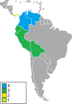 Sedes Juegos Bolivarianos